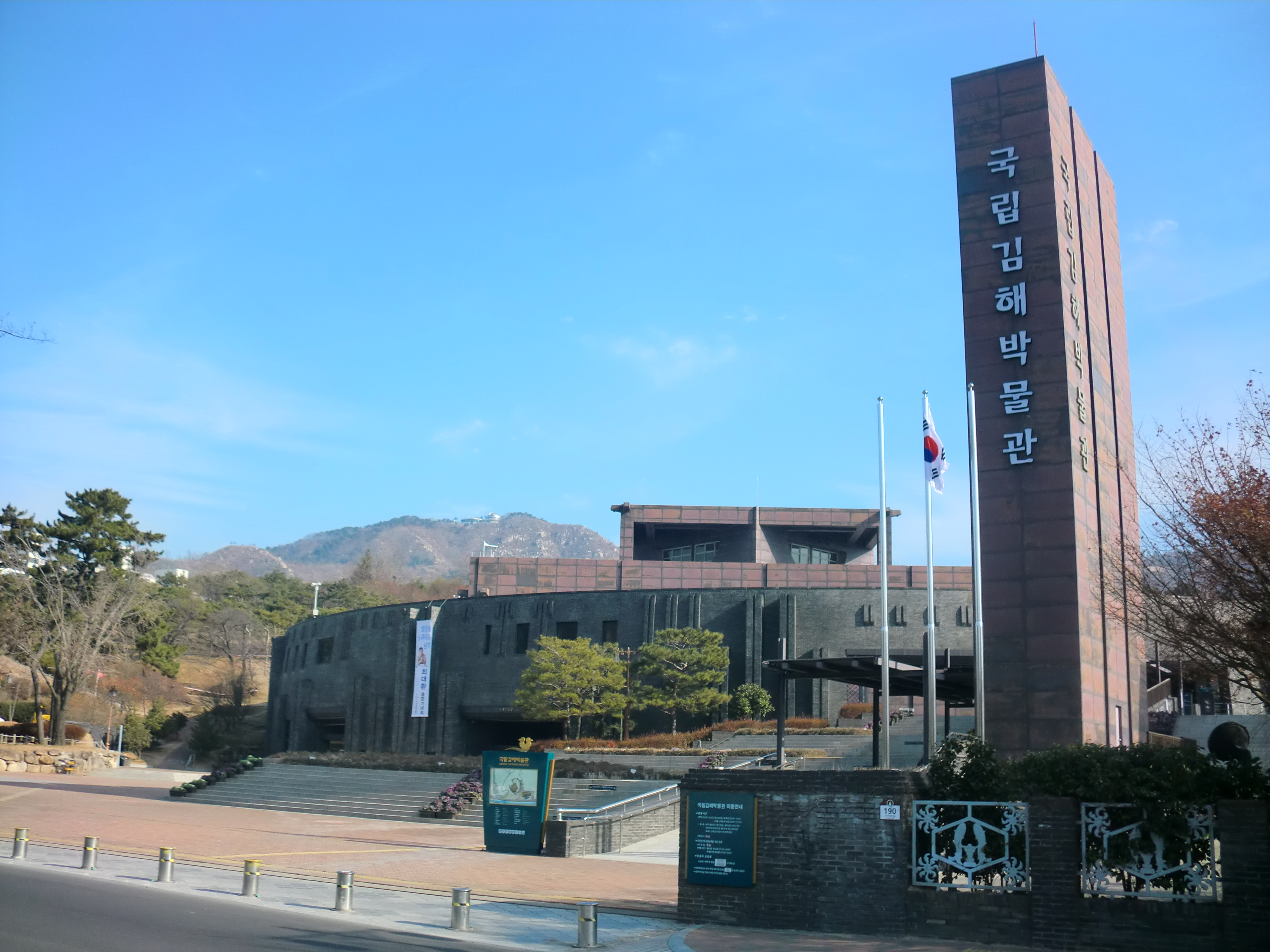 경상남도 김해시에 있는 국립김해박물관